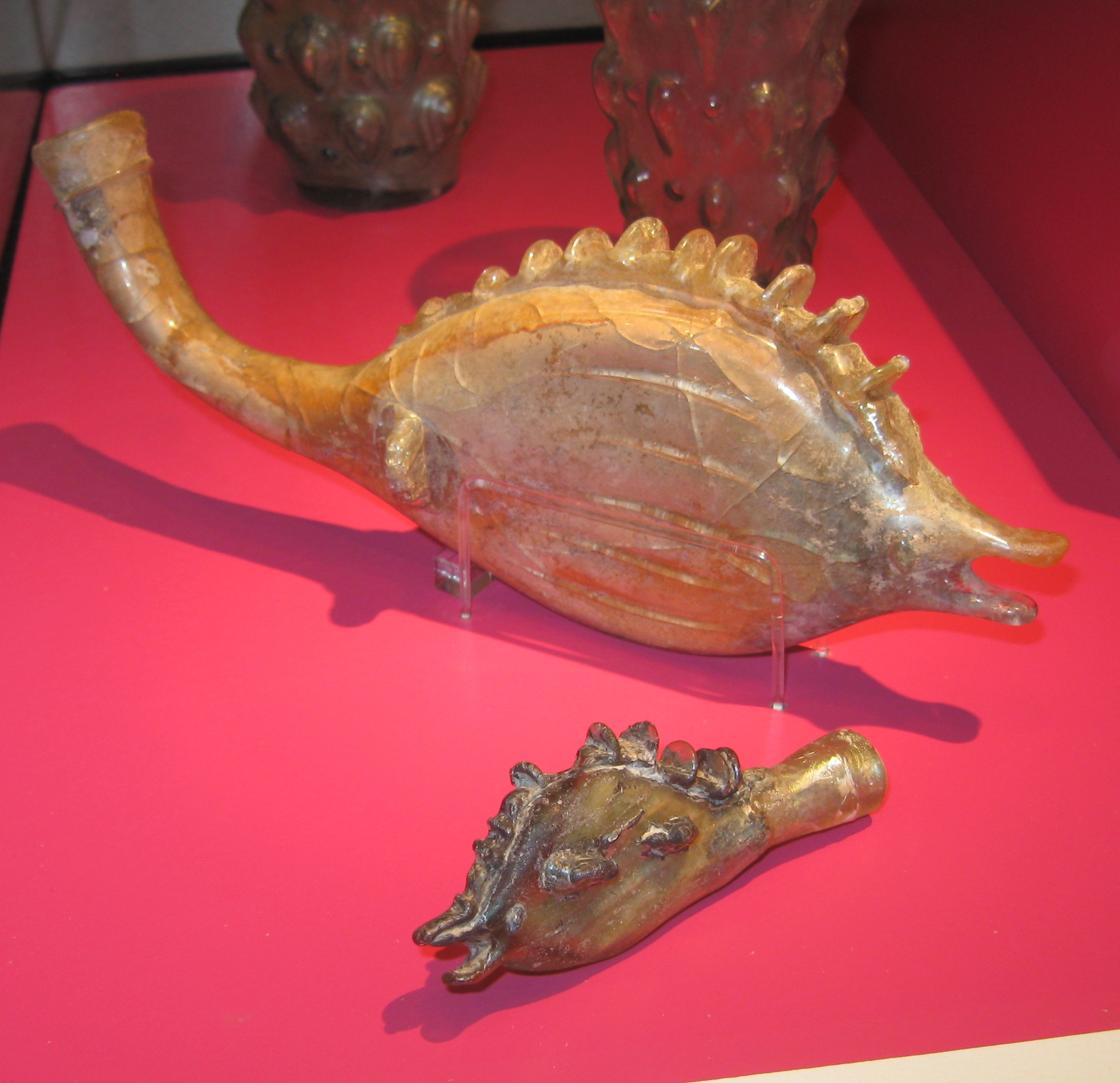 Frascos de cristal en forma de pez para garo en el Römisch-Germanisches Museum de Colonia